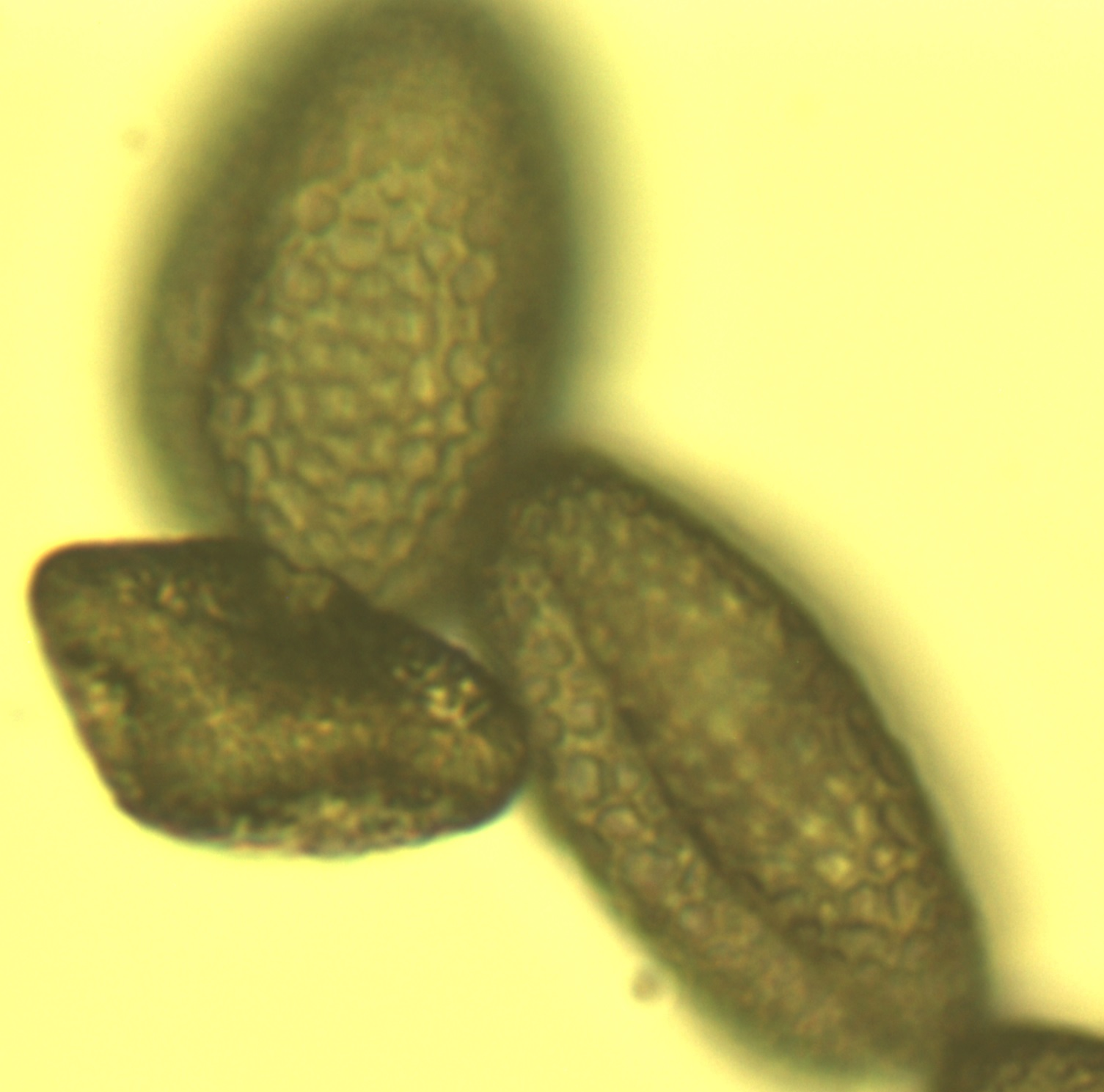 Forsythia Pollen 400x